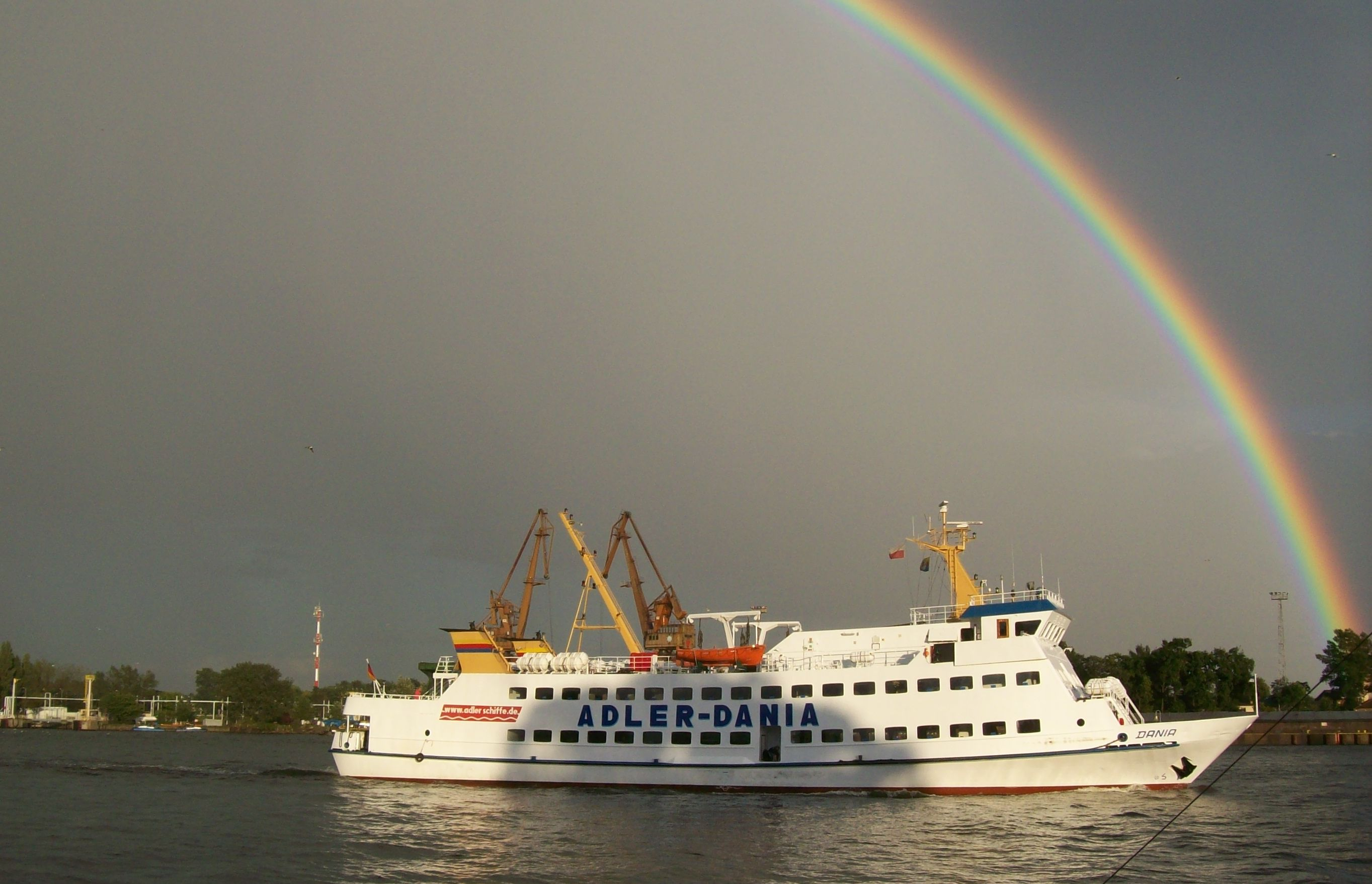 Stateczek białej floty w Świnoujściu.